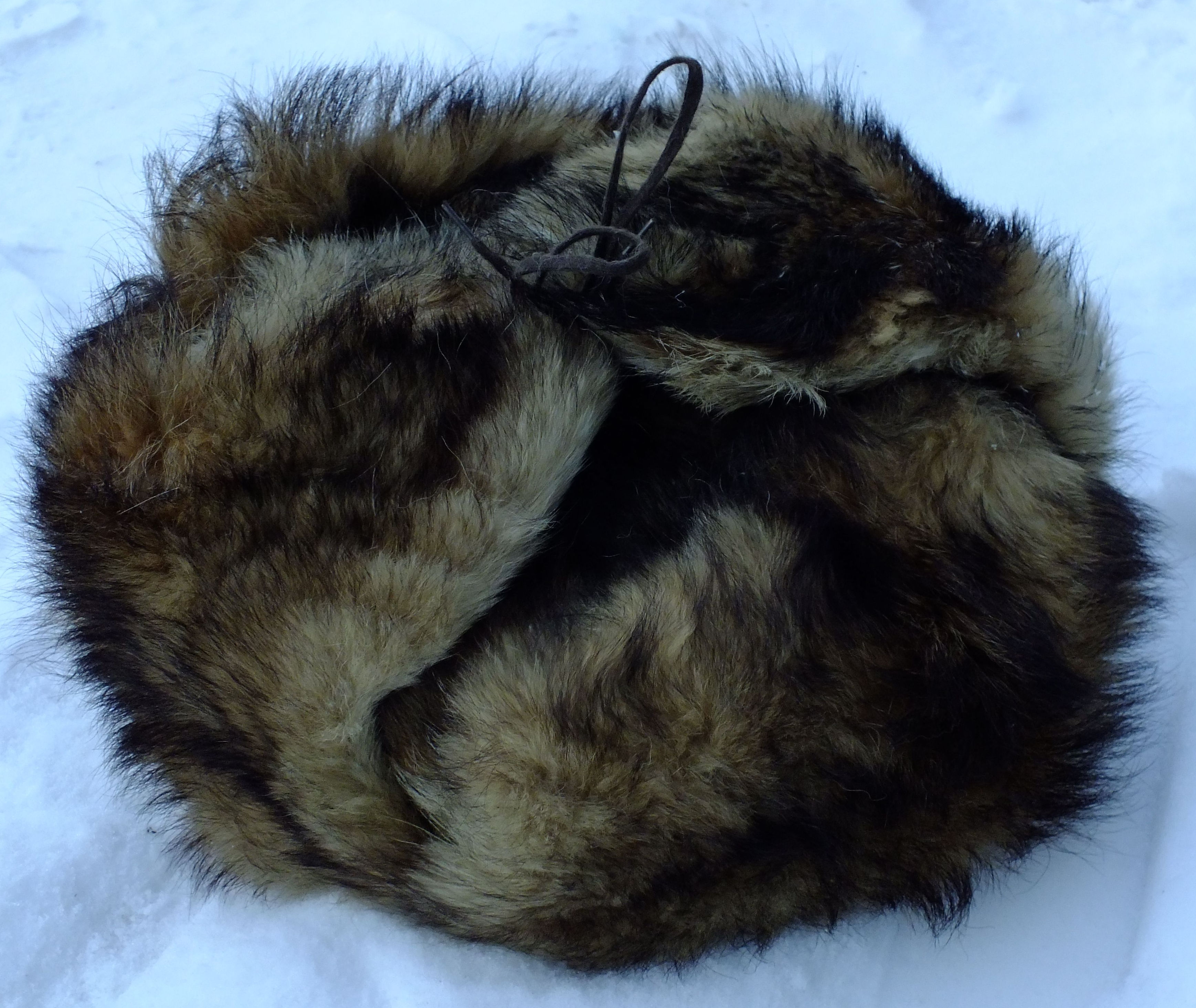 Шапка-ушанка, сшита из собачьего меха